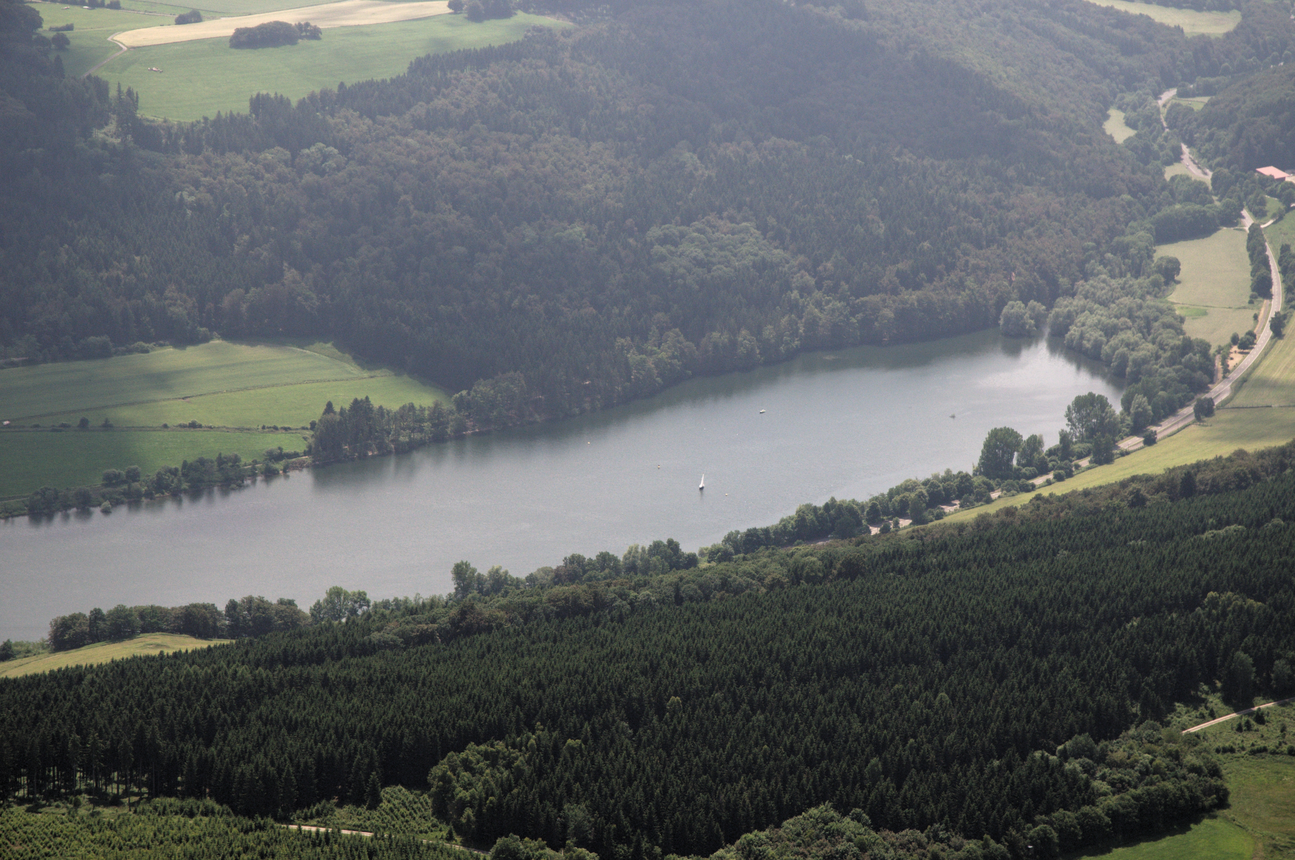 Fotoflug Sauerland-Ost: Diemelsee, Naturschutzgebiet Diemelsee